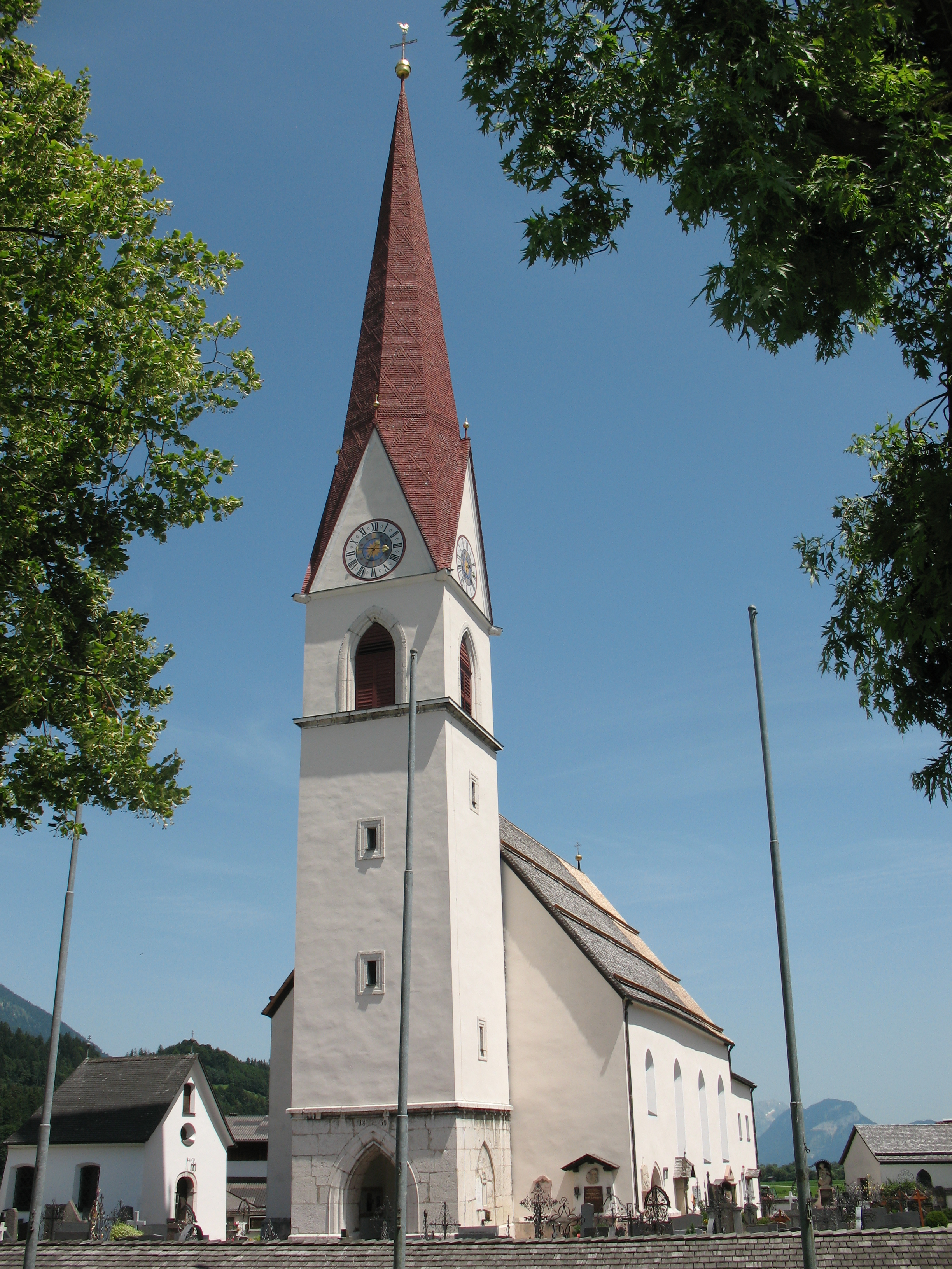 Kath. Pfarrkirche hl. Nikolaus und Kriegerdenkmal